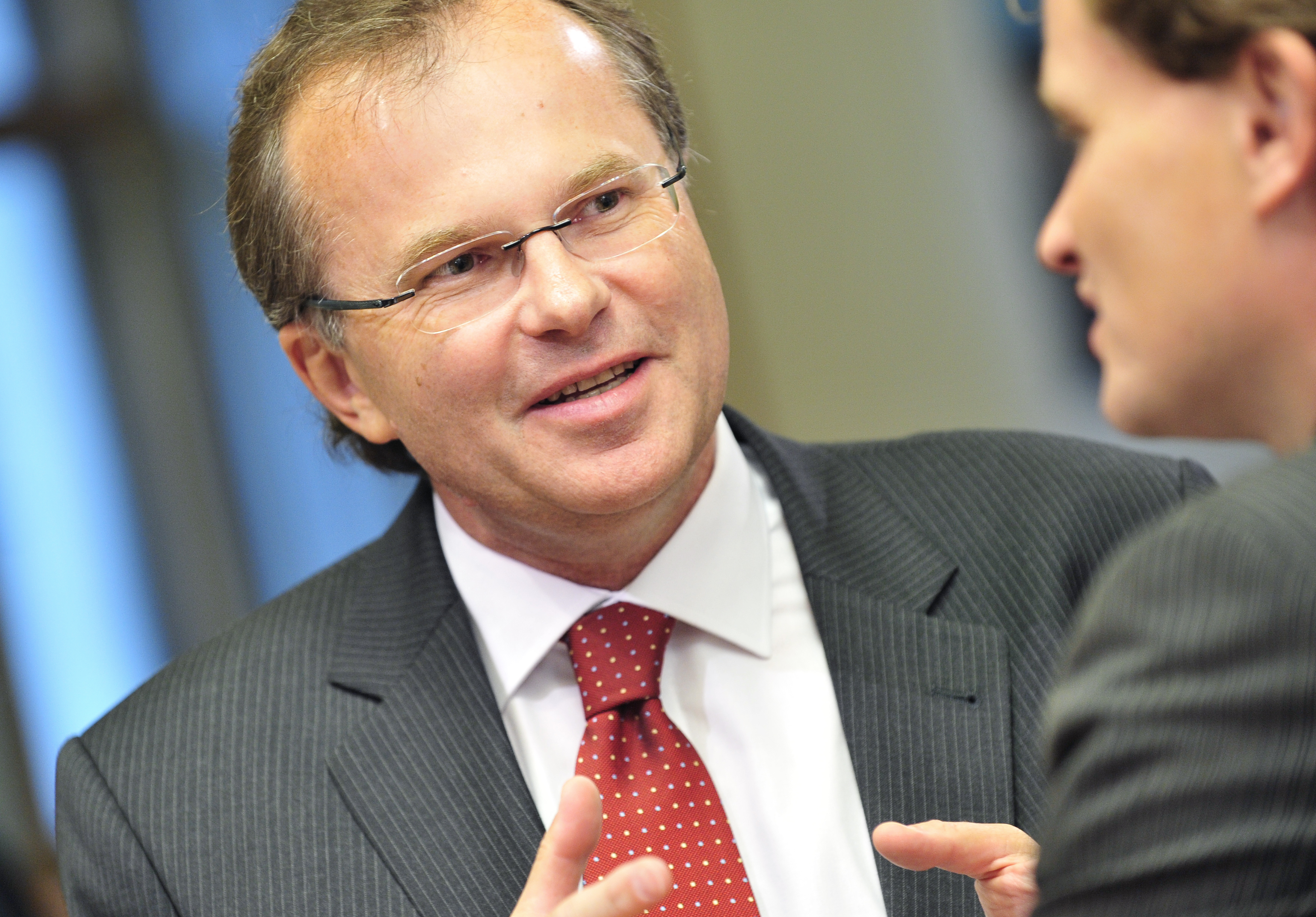 Günther Kräuter Enquete zum Thema "Mehr Gerechtigkeit für unsere arbeitenden Bäuerinnen und Bauern, Arbeit statt Hektar fördern" 16.09.2010 Foto: Johannes Zinner